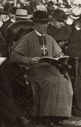 Mgr. Laurentius Josephus Antonius Hubertus Schrijnen [1861-1932], 18e bisschop (van 1913 - 1932) van het Bisdom Roermond. Foto uit 1916: Bisschop Schrijnen (3e van links) woont het openluchtspel 'de legenden van Sint Servaas' bij op het Vrijthof tijdens de Heiligdomsvaart van Maastricht. Links naast hem: ofwel de burgemeester van Maastricht, Leopold van Oppen; ofwel de gouverneur van Limburg, jhr. mr. Ch.J.M. Ruys de Beerenbrouck.